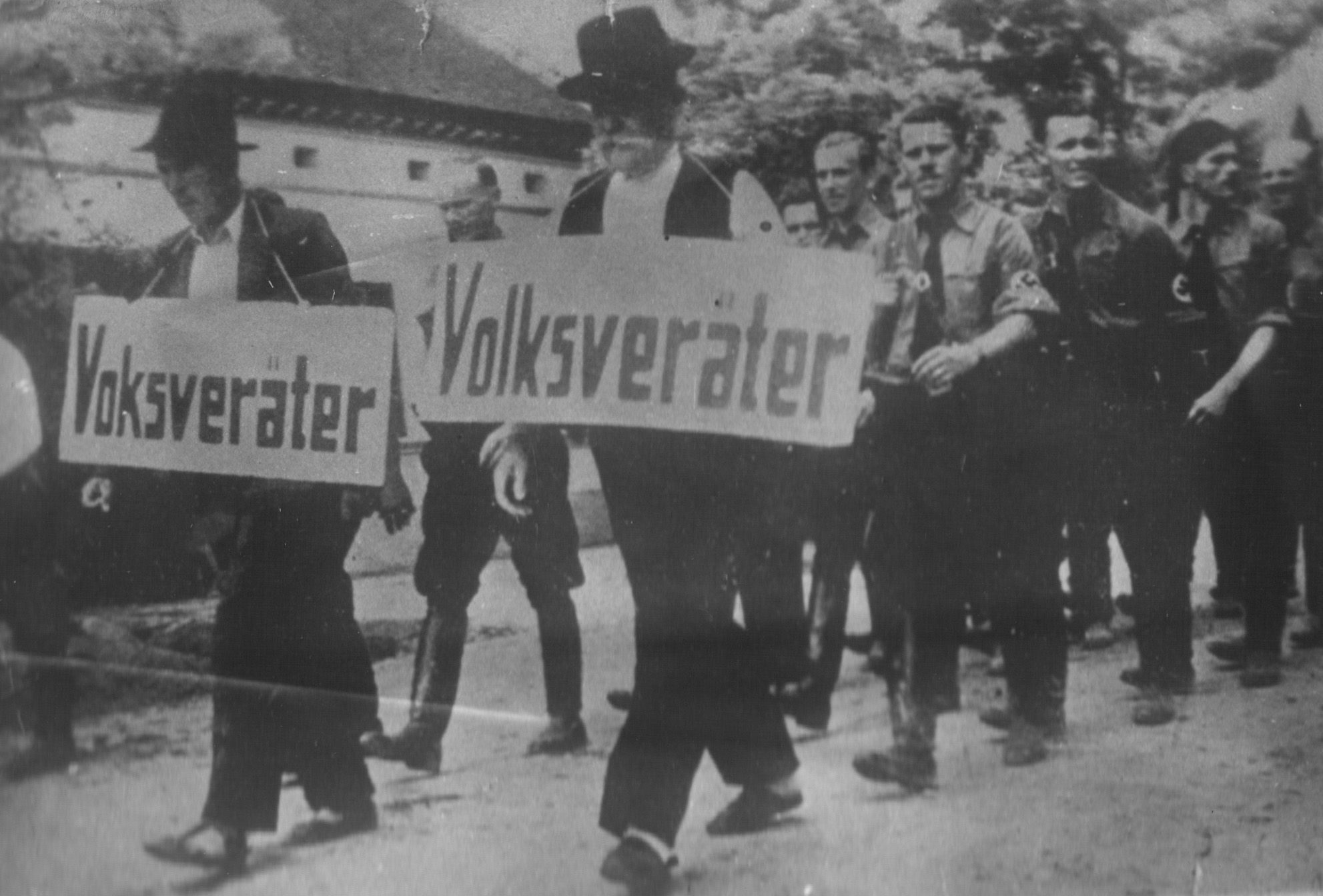 Srpskohrvatski / српскохрватски: Domaće Nemce iz Osijeka koji se nisu hteli upisati u fašističku organizaciju gone fašisti sa natpisom narodne izdajice